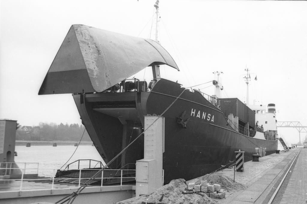 im Nordhafen.